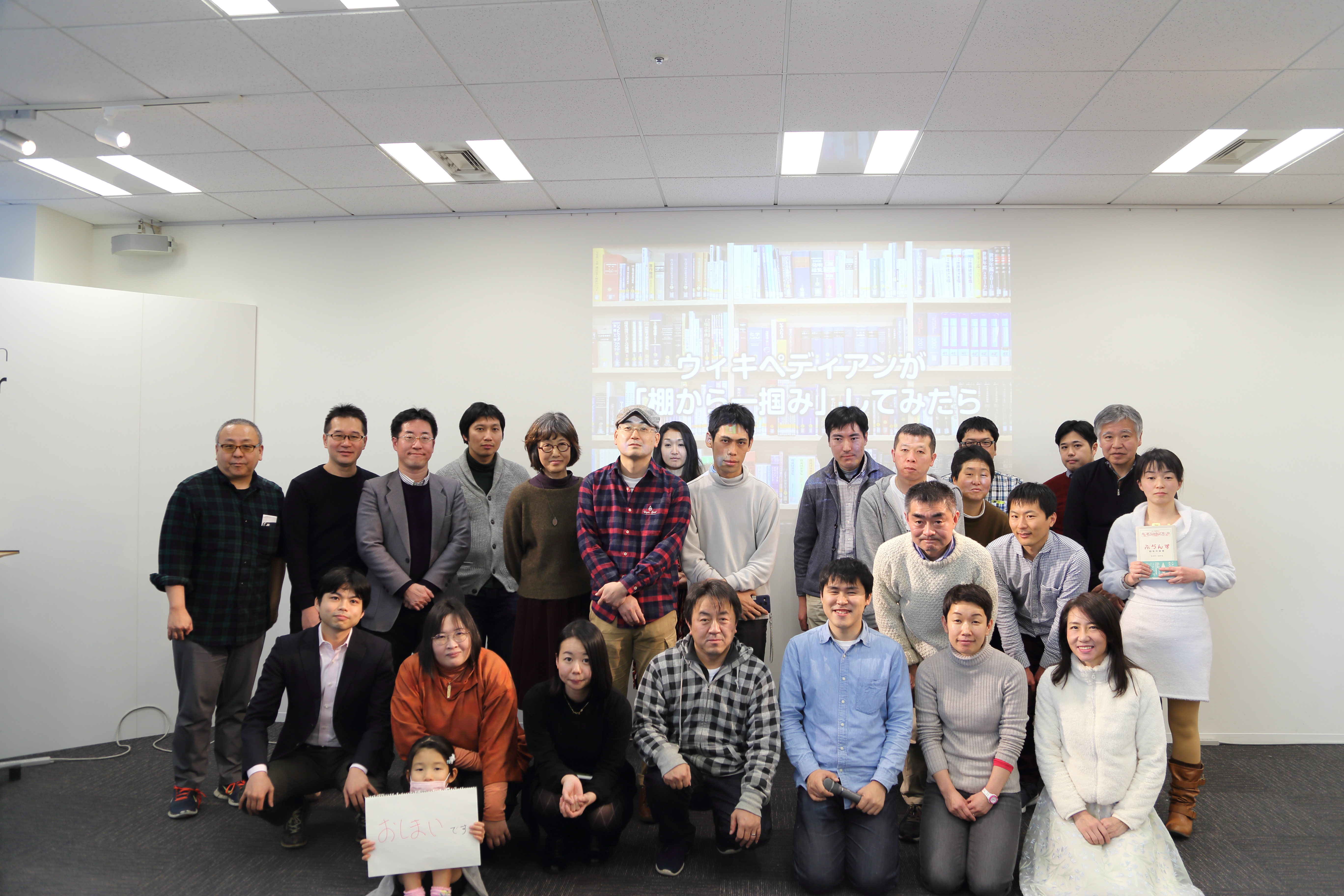 2019年1月20日に東京ミッドタウンで行われたオフラインイベント「ウィキペディアンが棚から一掴みしてみたら」での参加者集合写真。